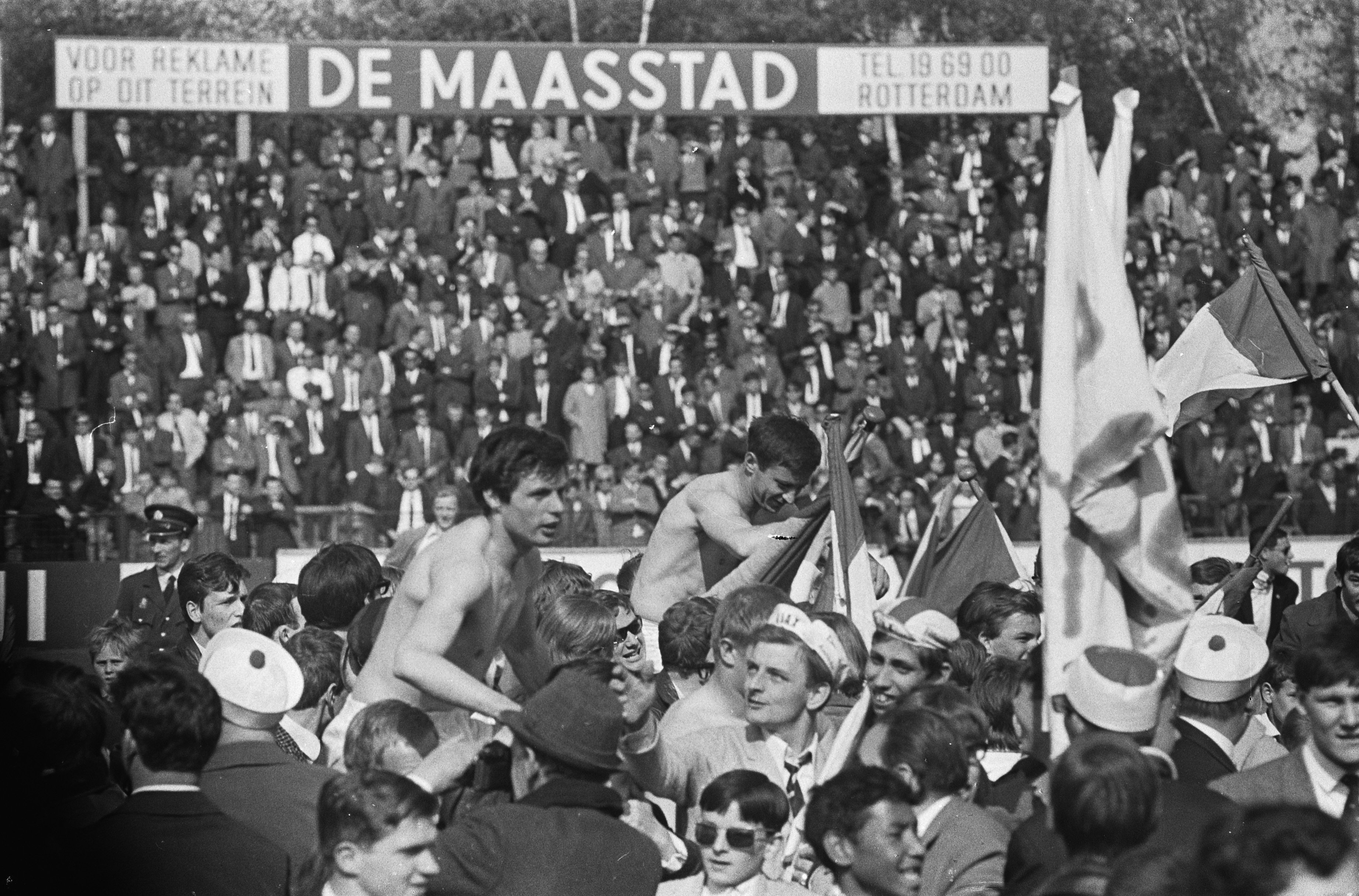 Collectie / Archief : Fotocollectie Anefo Reportage / Serie : [ onbekend ] Beschrijving : Ajax kampioen, links Suurbier en rechts Vasovic op schouders van supporters Datum : 30 april 1967 Trefwoorden : SUPPORTERS, kampioenen, sport, voetbal Persoonsnaam : Suurbier, Wim, Vasovic, Velibor Fotograaf : Koch, Eric / Anefo Auteursrechthebbende : Nationaal Archief Materiaalsoort : Negatief (zwart/wit) Nummer archiefinventaris : bekijk toegang 2.24.01.05 Bestanddeelnummer : 920-2833